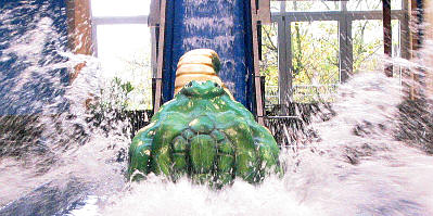 Kids-Dinoworld in Benstorf/Quanthof